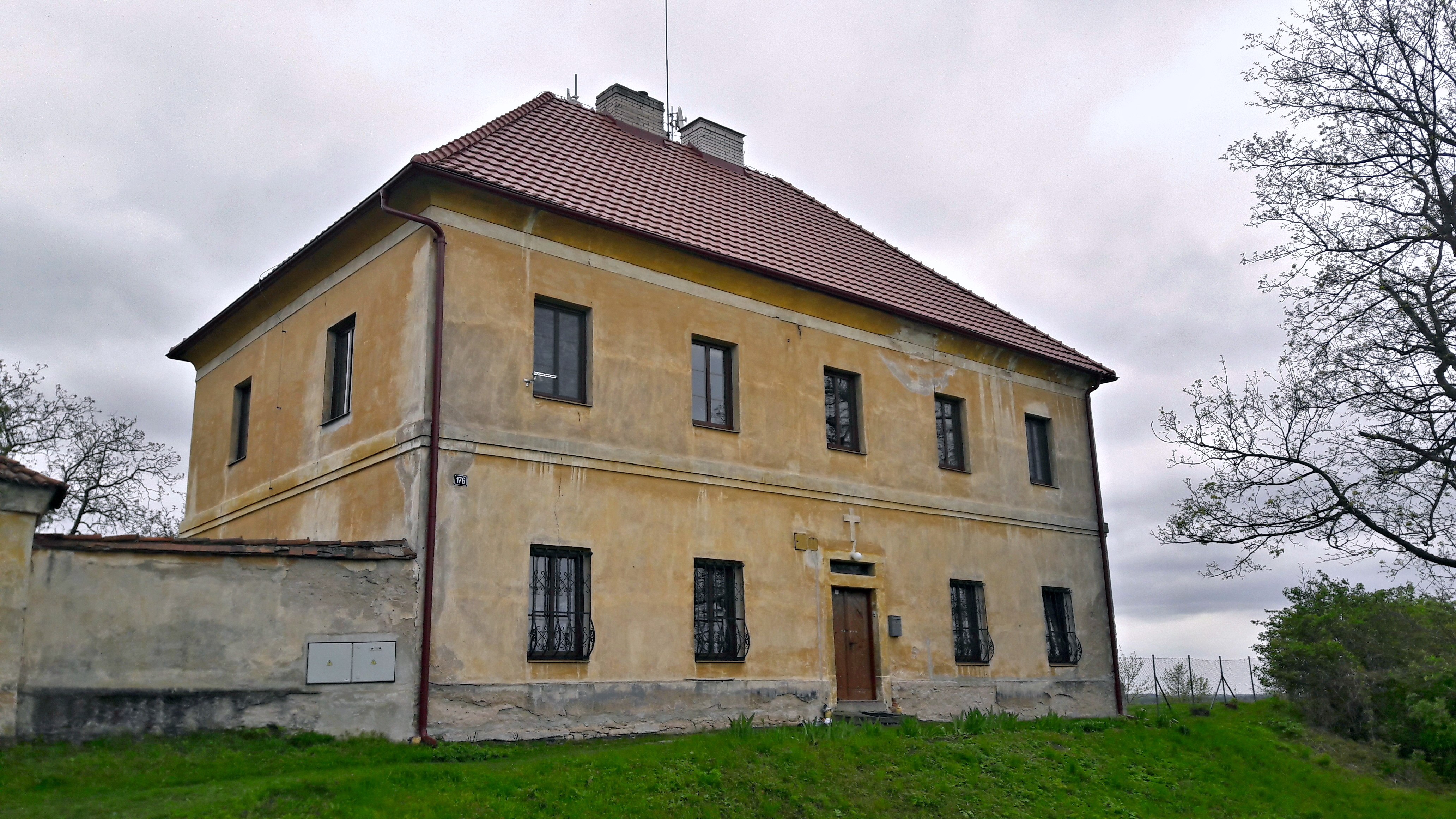 Sadská